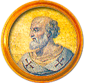 Médaillon de la frise des papes à Saint-Paul-hors-les-Murs. Il s'agit d'une mosaïque représentant Vigile, 59e pape de l'Église catholique (29 mars 537-7 juin 555). Il fait partie de la série de médaillons voulue par Grégoire XVI destinée à remplacer ceux de l'ancienne basilique après l'incendie de 1823.